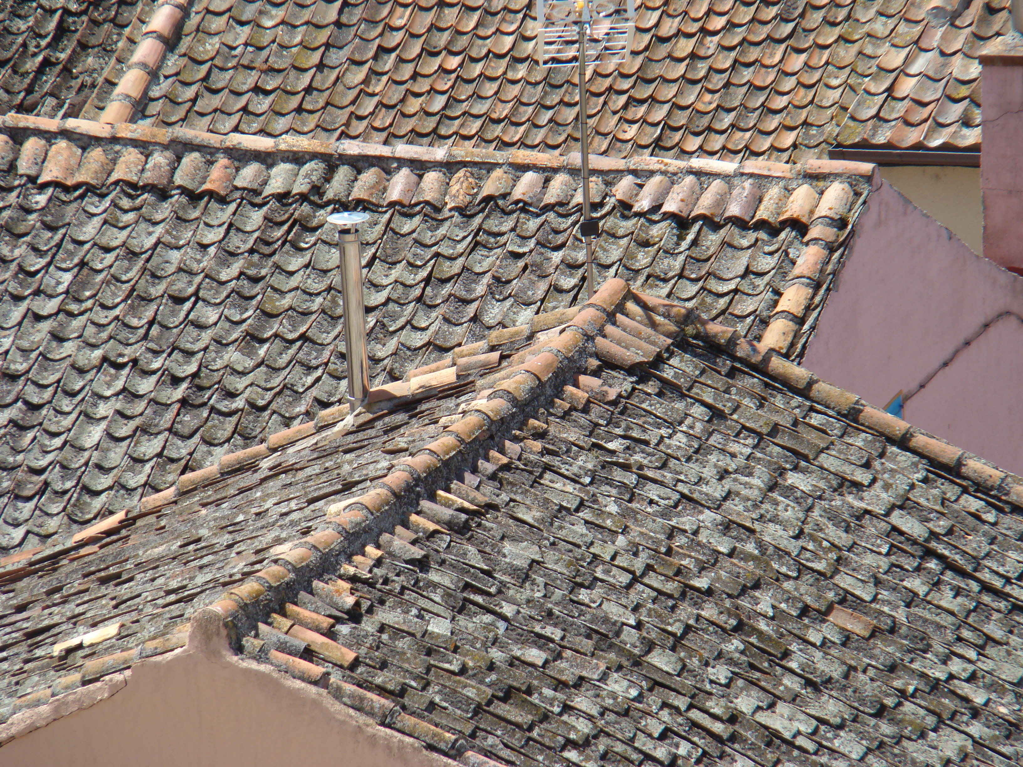 Tejado en la localidad segoviana de Turégano (España). Las tejas están dispuesta con el método llamado a la segoviana que consiste en colocar sólo piezas canales, recibidas sobre un lecho de barro que permite la dilatación e impermeabiliza las juntas, sin necesidad de piezas cobija.